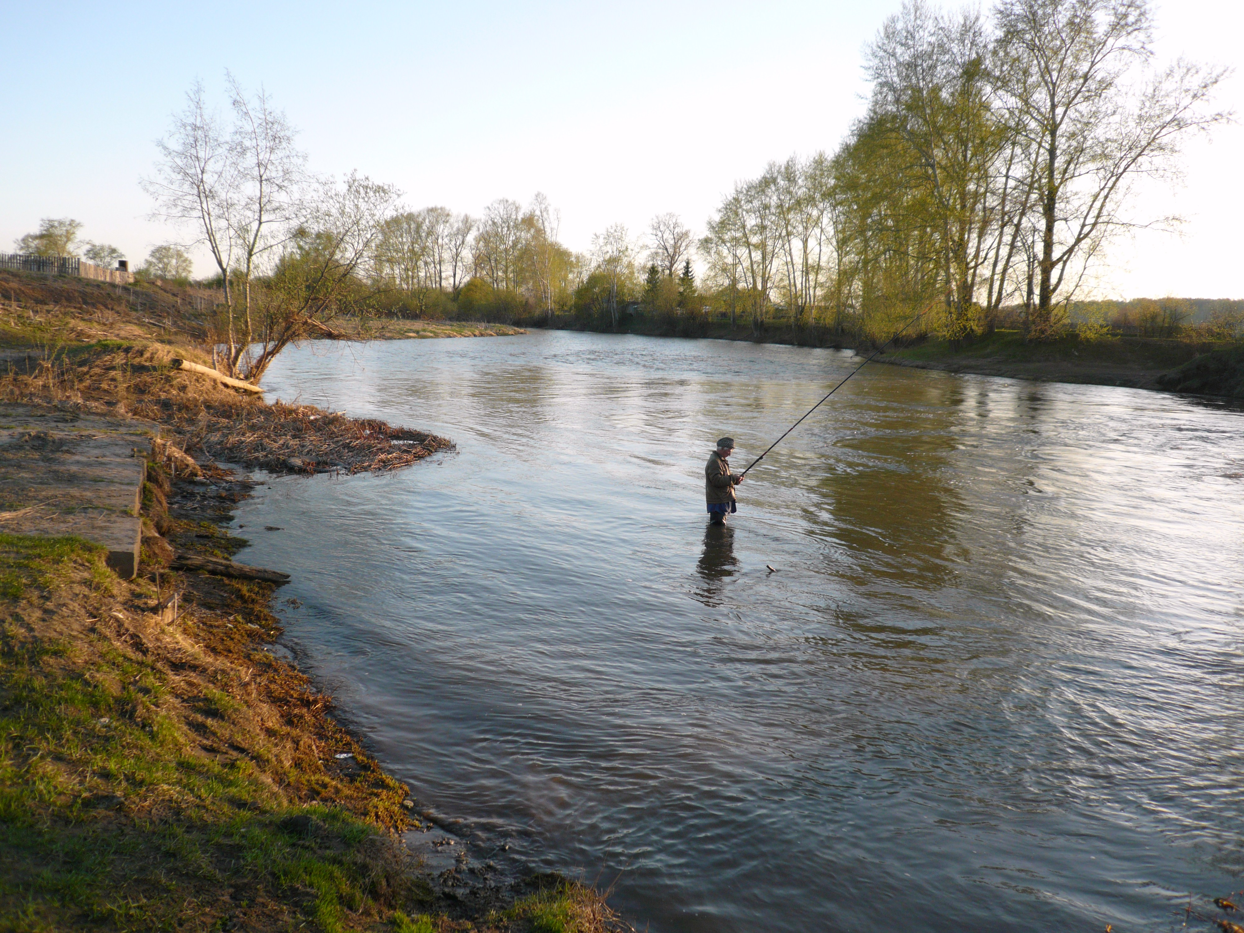 Река Шаква возле села Плеханово.